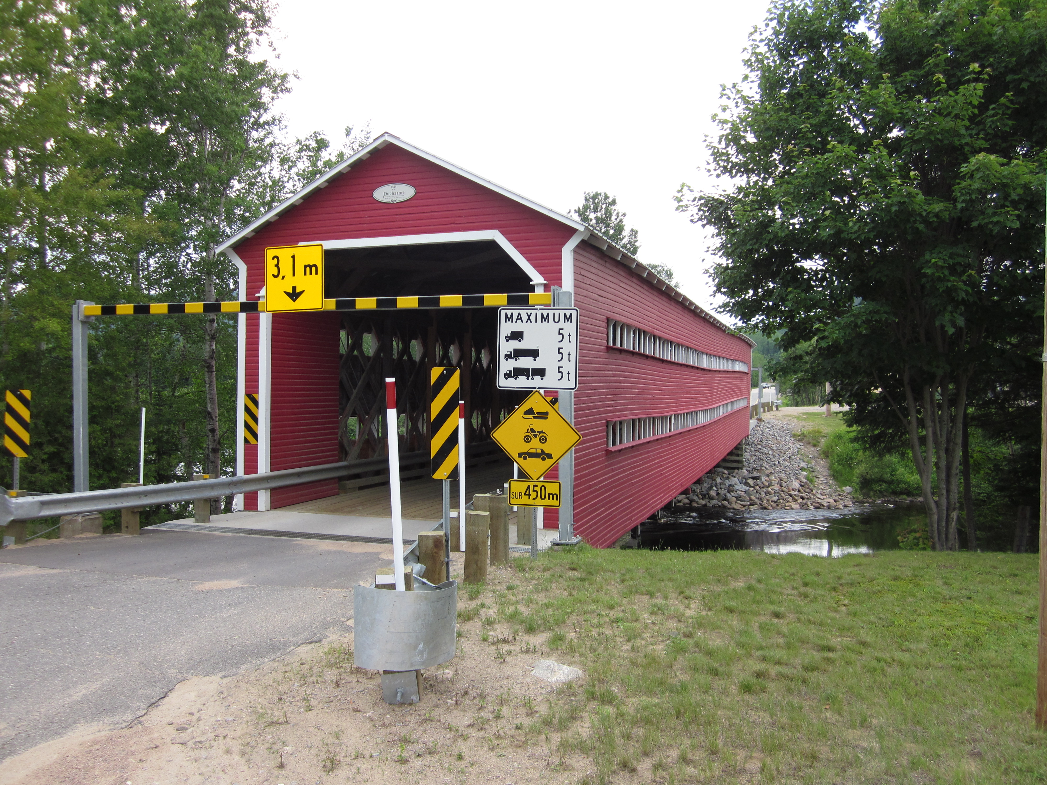 Pont Ducharme vue du côte Est.